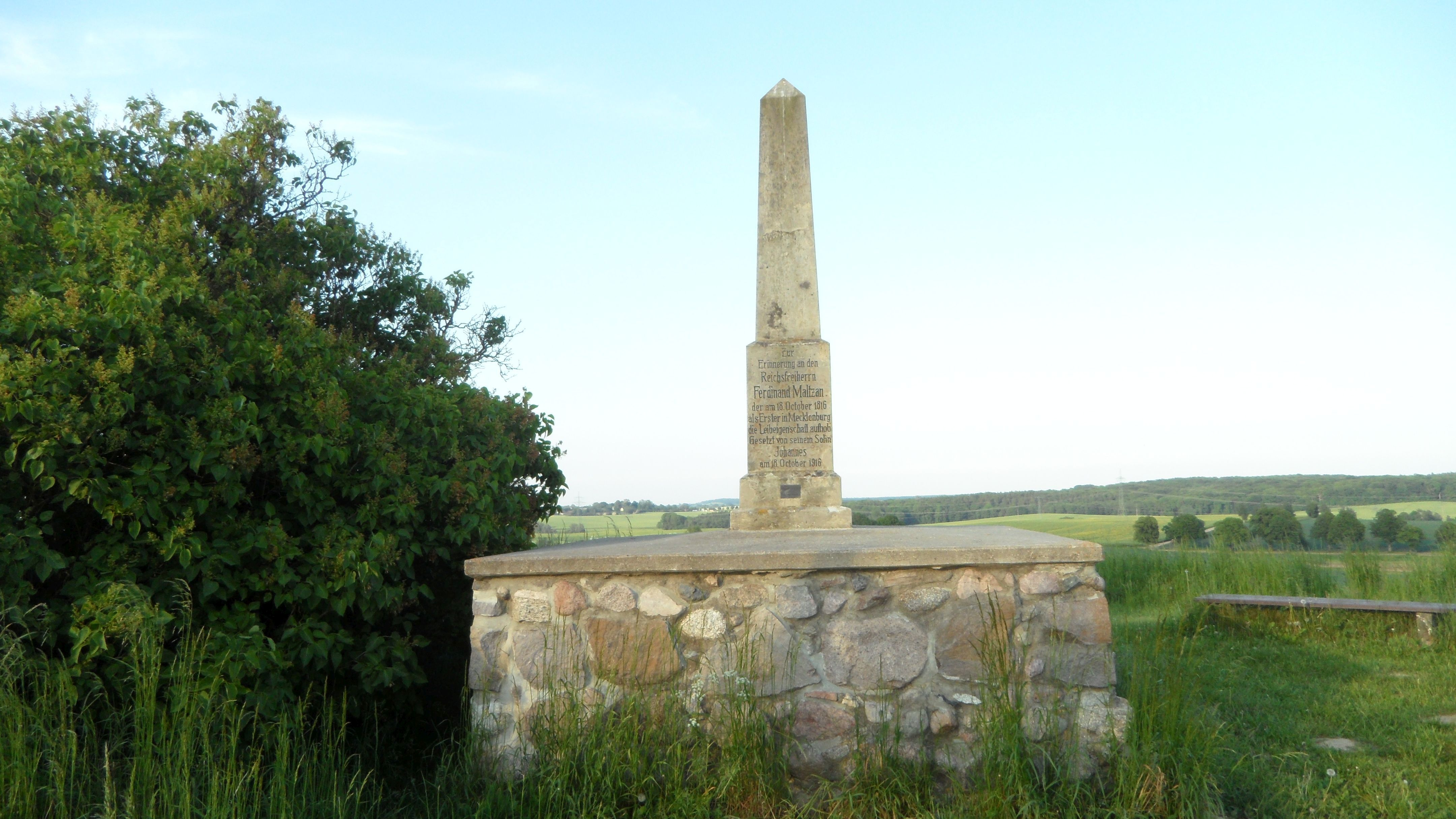 Dass so ein Denkmal hier steht, wissen viele Menschen der Umgebung. Was auf ihm steht bzw. was er bedeutet, die wenigsten! Die jungen Leute schon gar nicht!